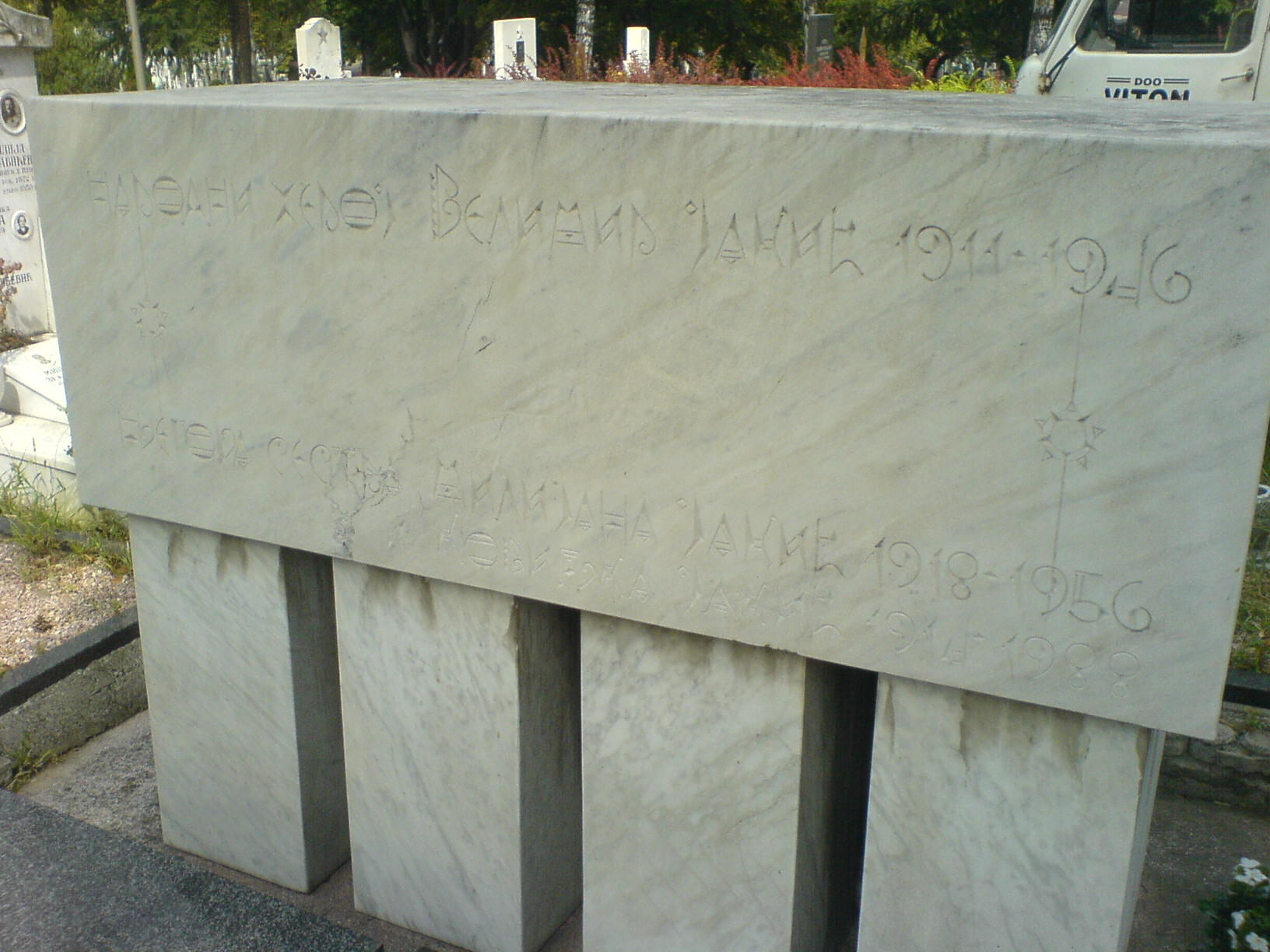 Grob Velimira Jakica